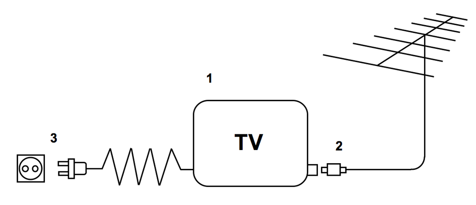 Het TV model. Voorbeeld van de vorming van een model. December 2005 Laurens van Lieshout.